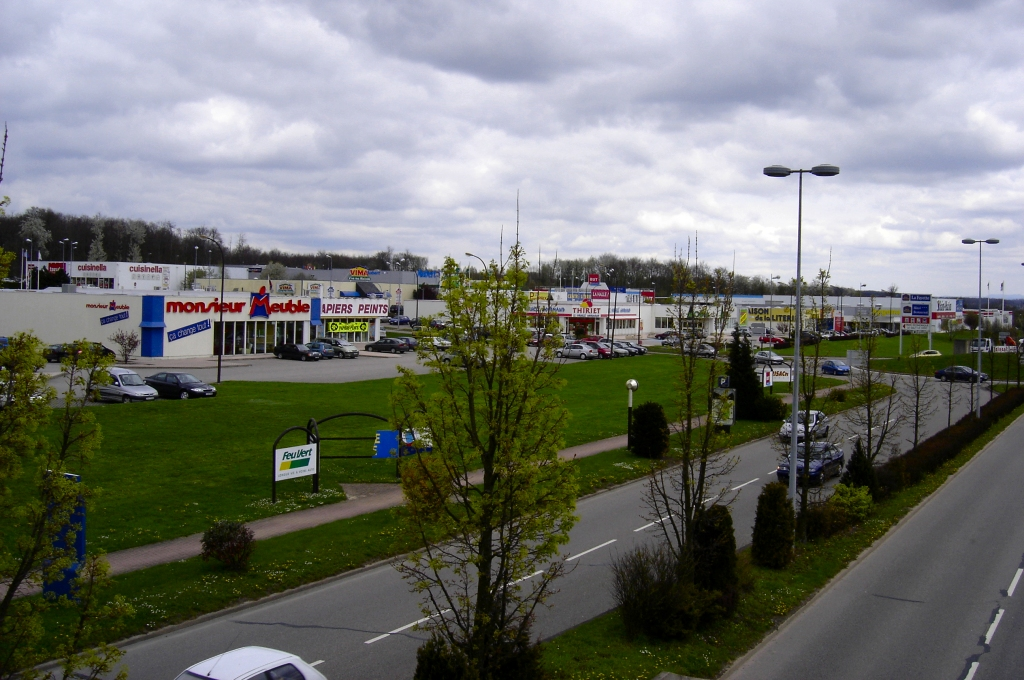 La première zone commerciale d'Epinal.